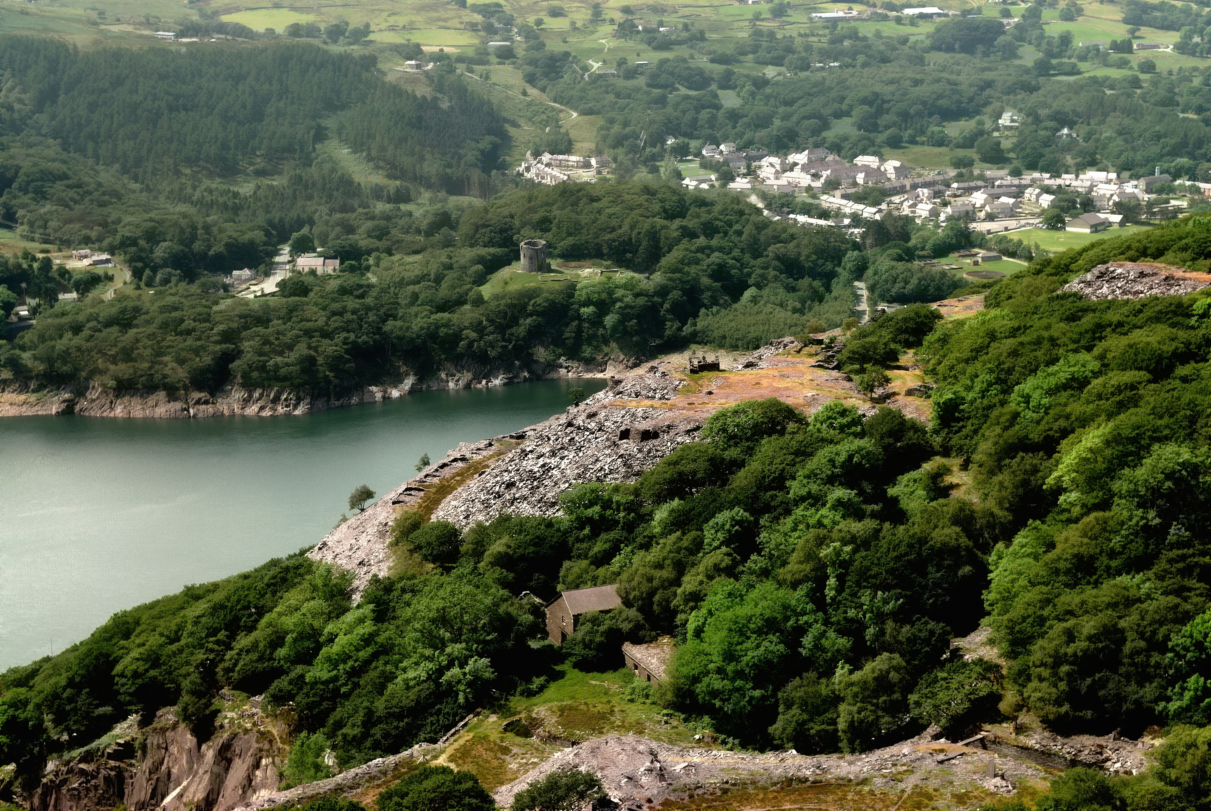 Панорамен изглед от Ланберис